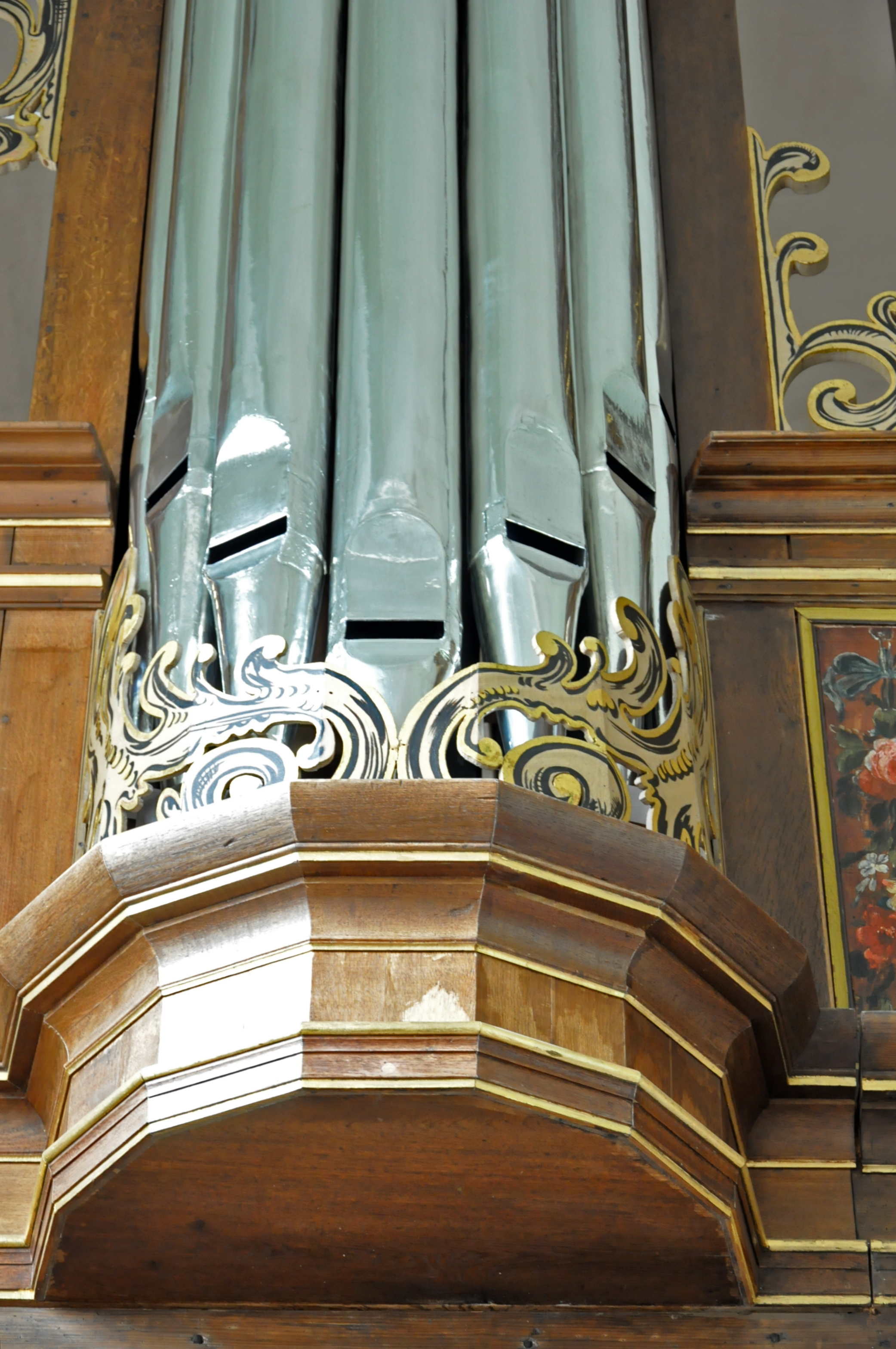 Orgel in Steinkirchen, Niedersachsen